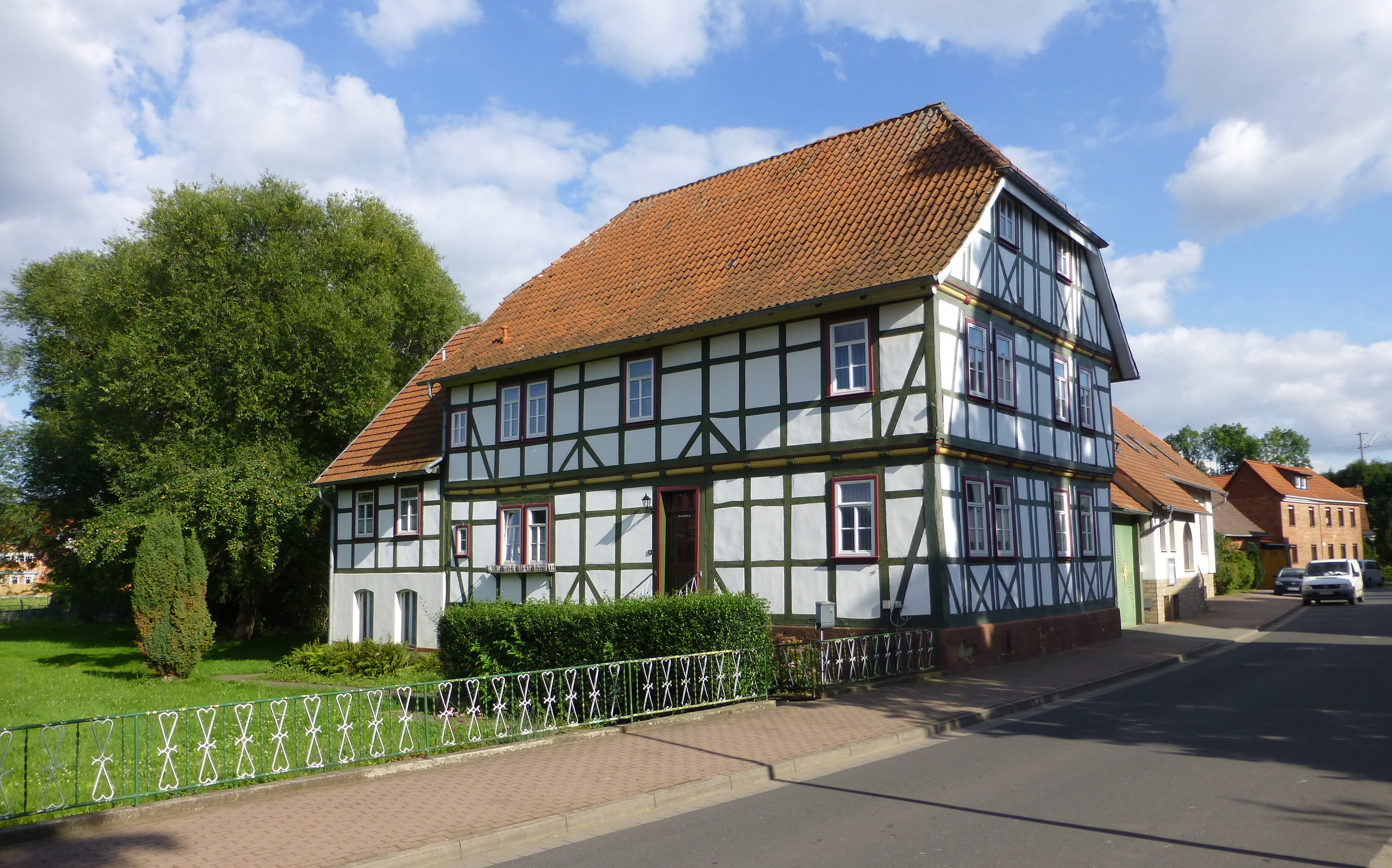 Fachwerkgebäude in Westhausen, Landkreis Eichsfeld